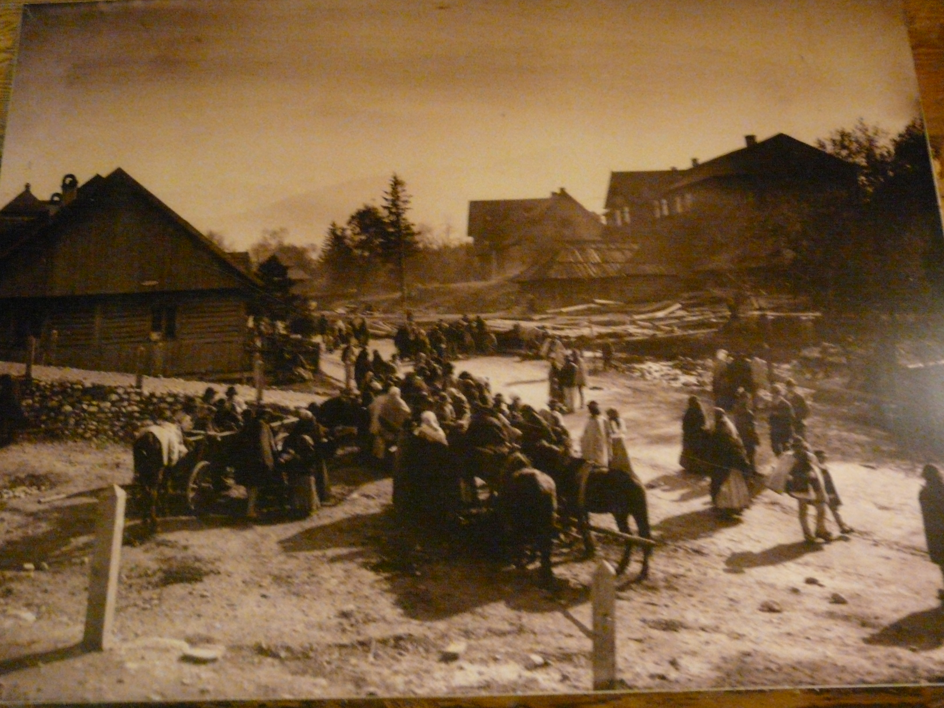 Zakopane. Zespół dworsko-parkowy w Kuźnicach, okolice i wnętrza. Walery Eljasz - skrzyżowanie ulic Kościelskiej, Nowotarskiej i Krupówek, 1891 r.